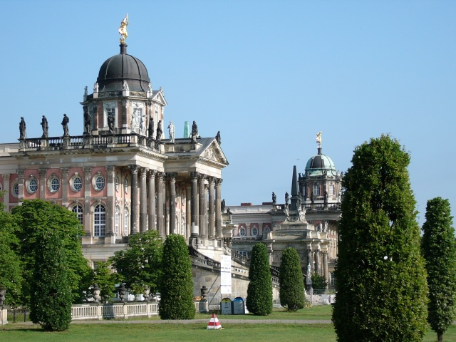 Universität Potsdam, Communs